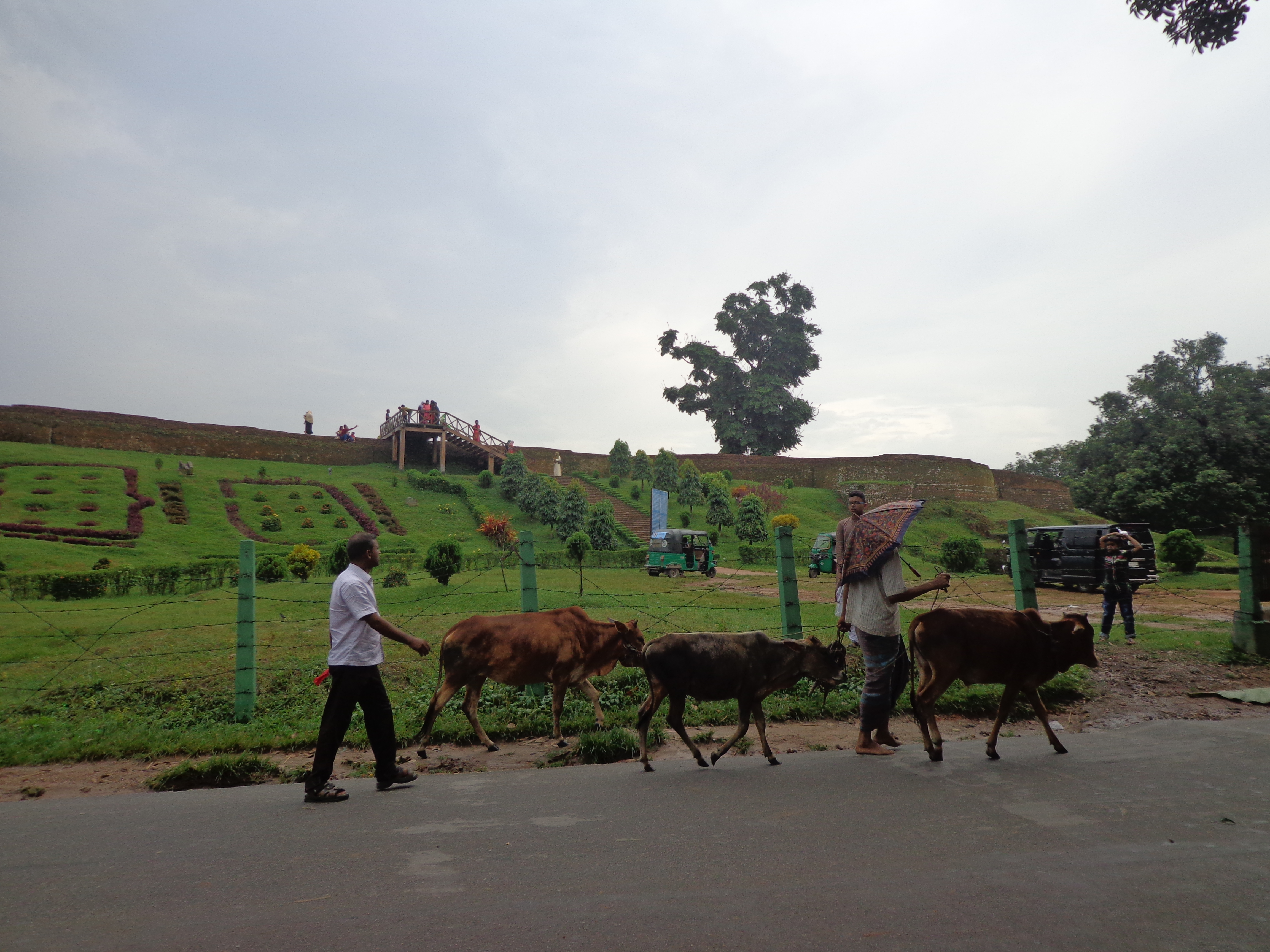 মহাস্থানগড়